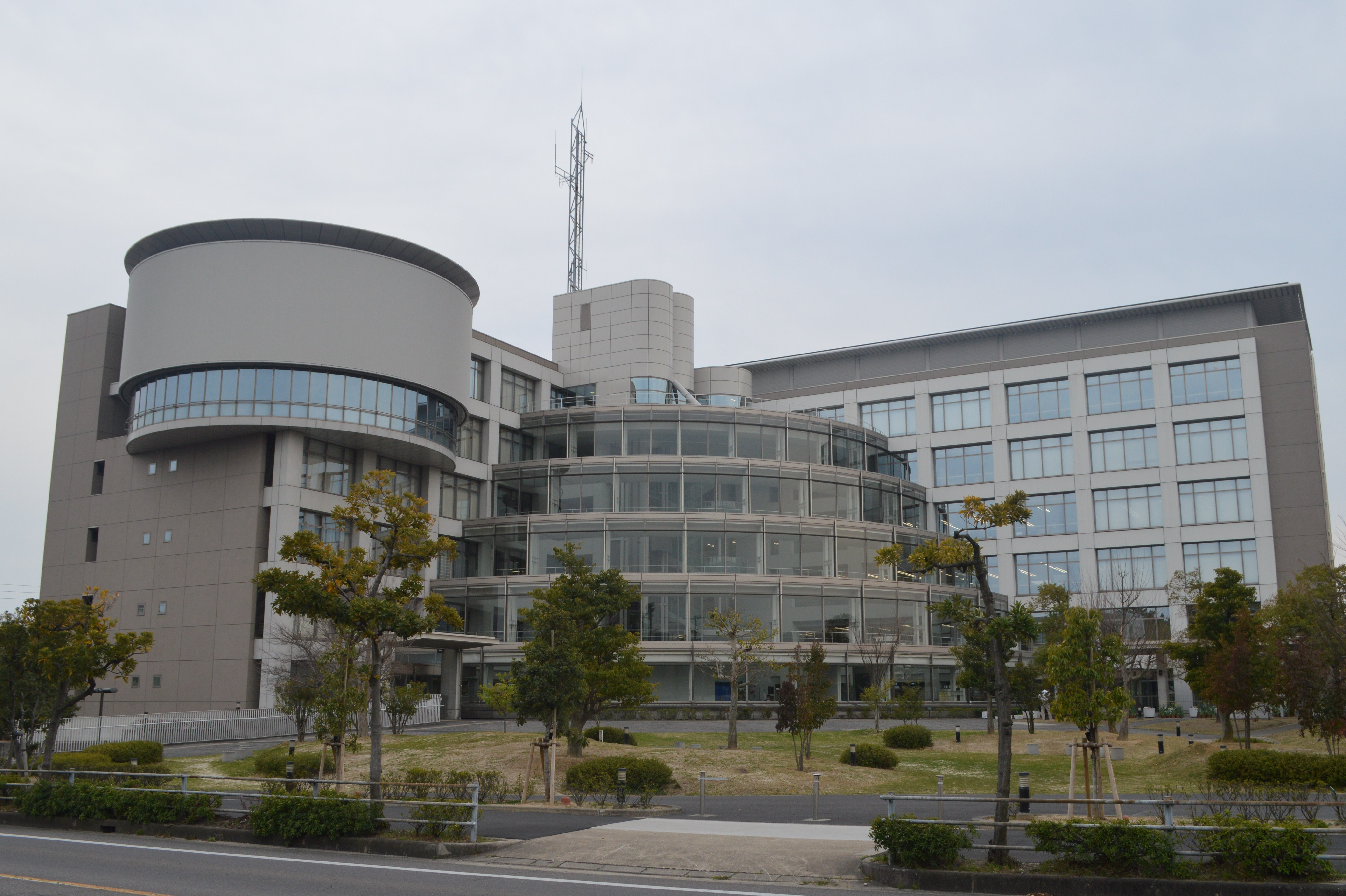 愛知県大府市役所